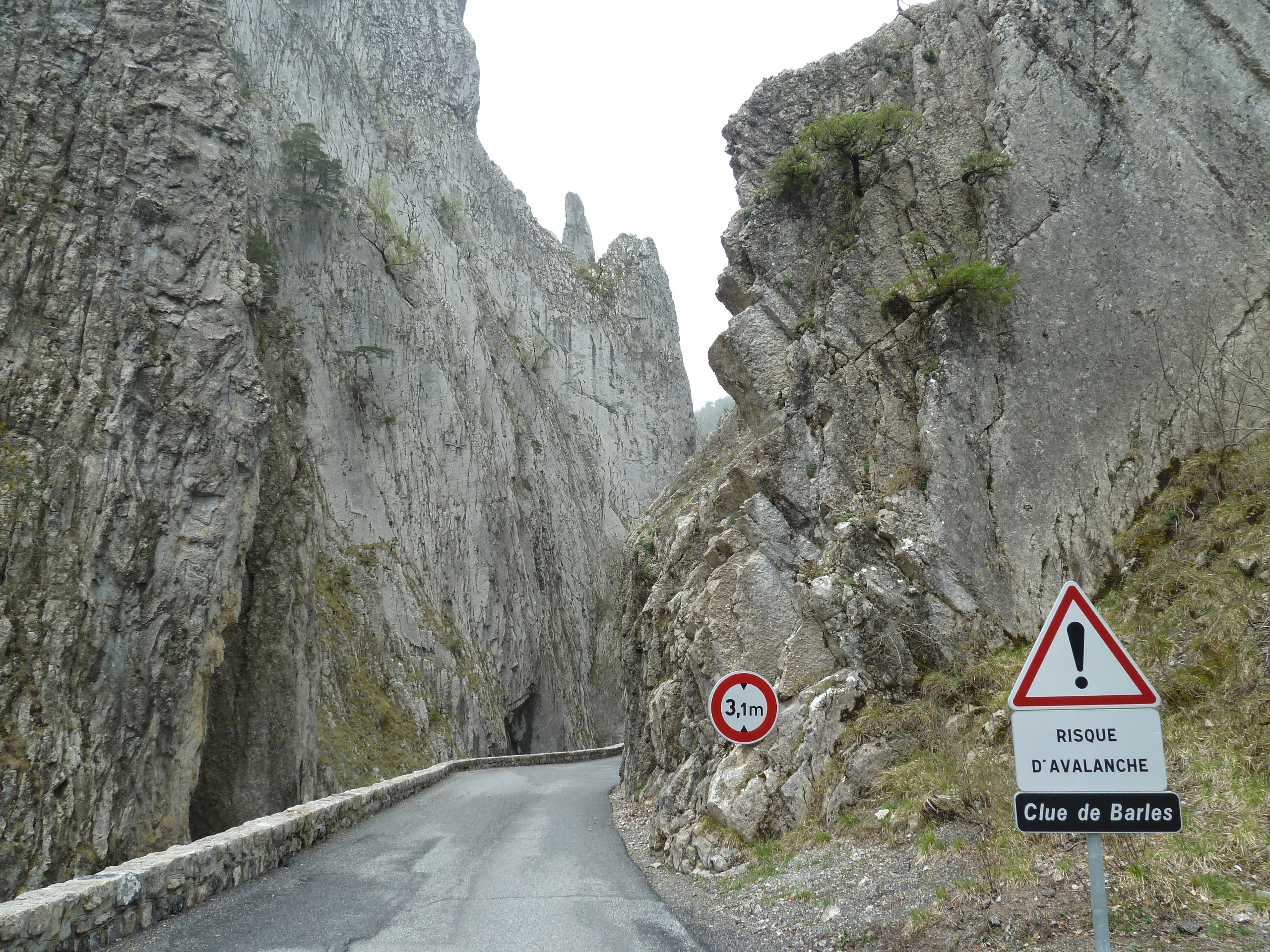 L'entrée nord de la Clue de Barles